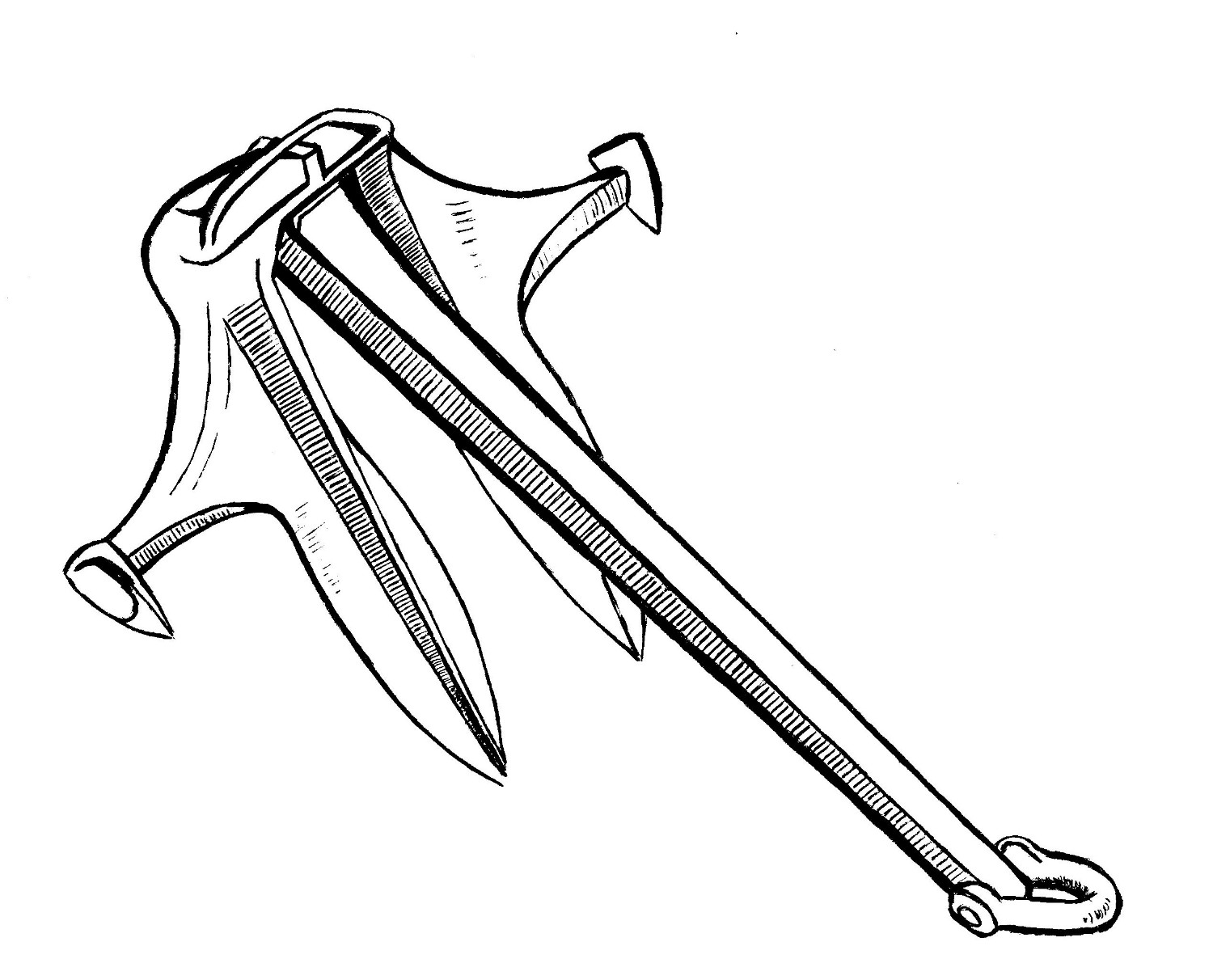 Якорь Матросова, повышенной держащей силы